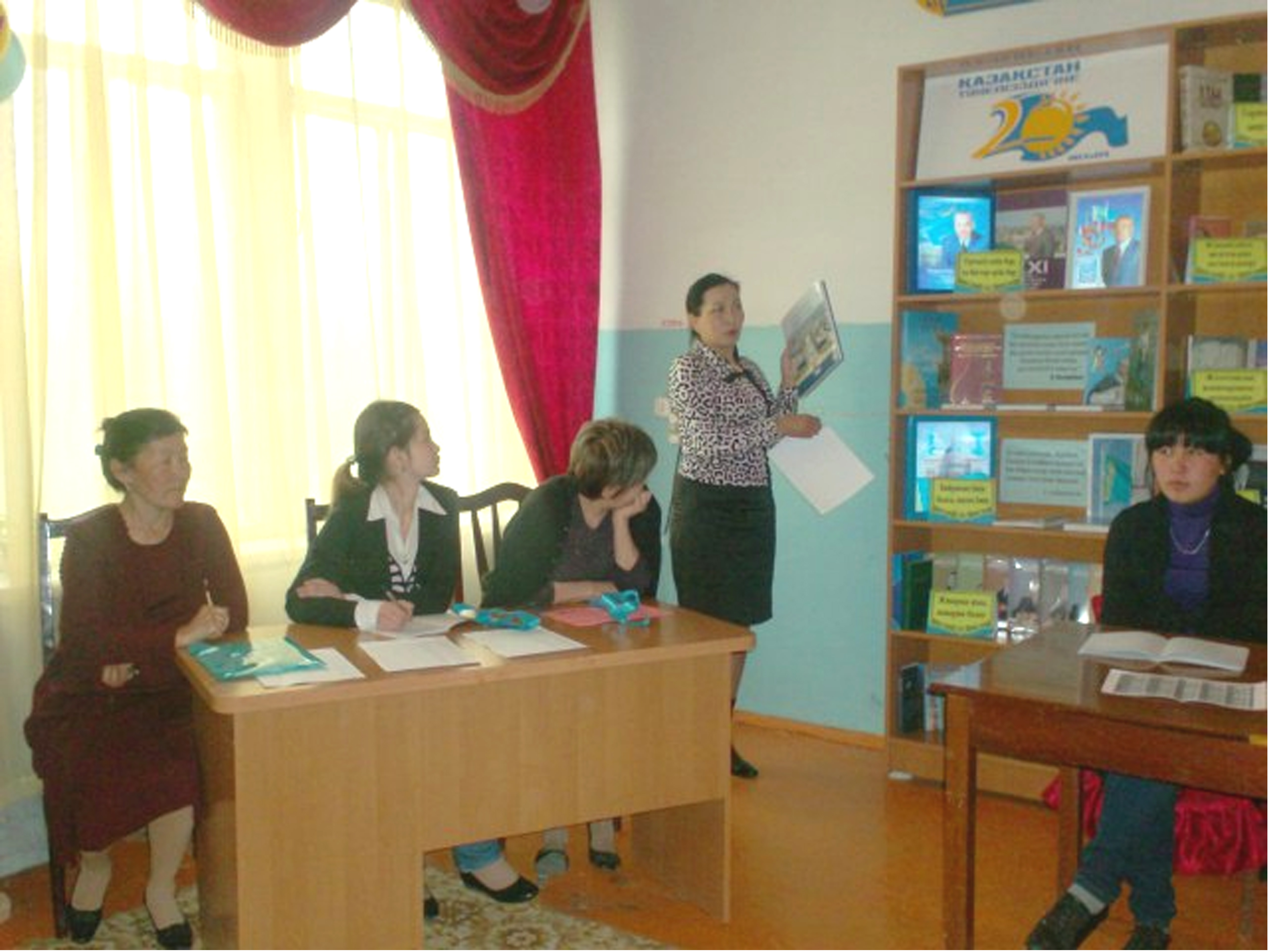 Бәйдібек орталықтандырылған кітапханалар жүйесі